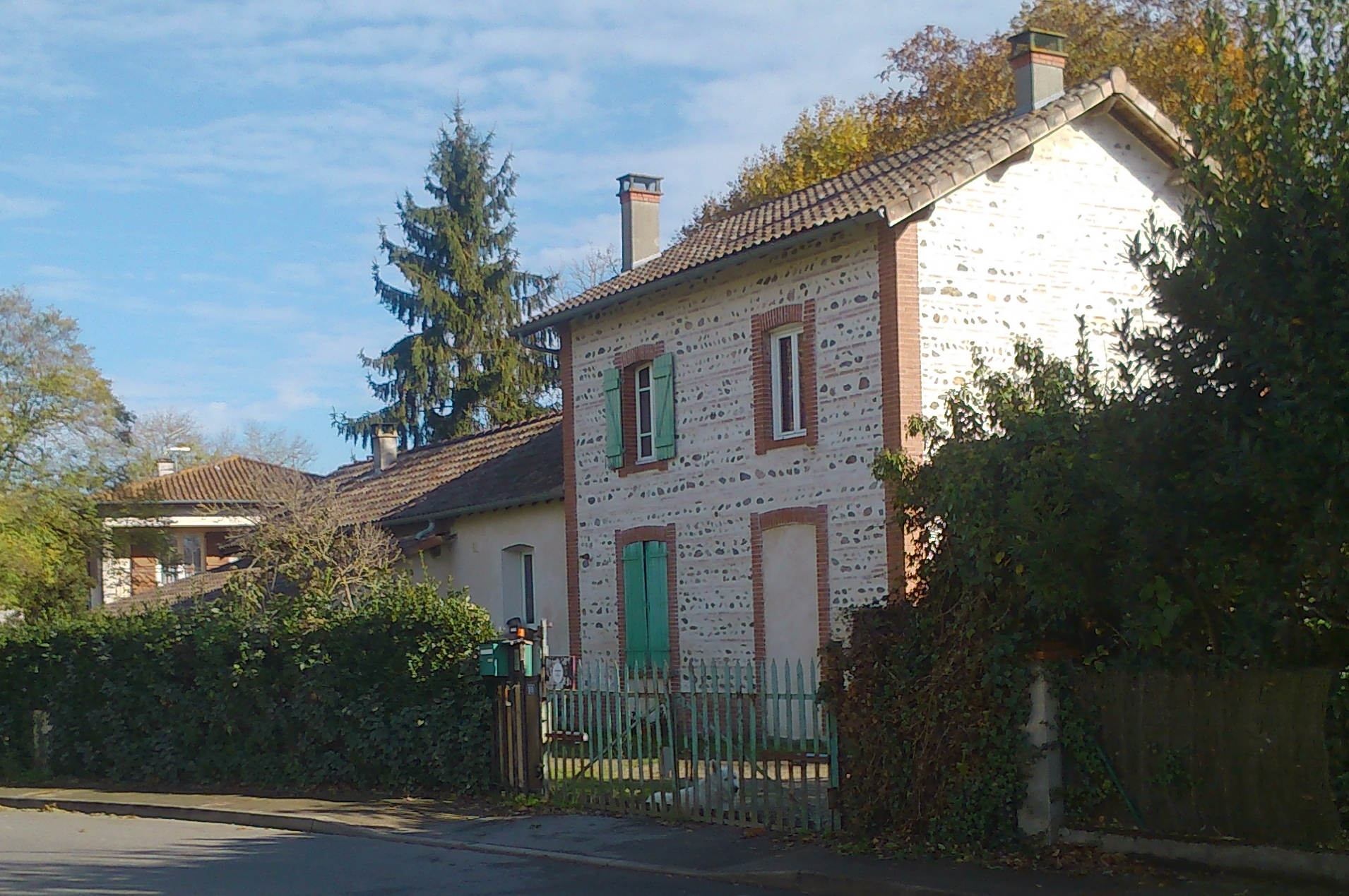 L'ancienne gare de Saint-Lys en 2018.